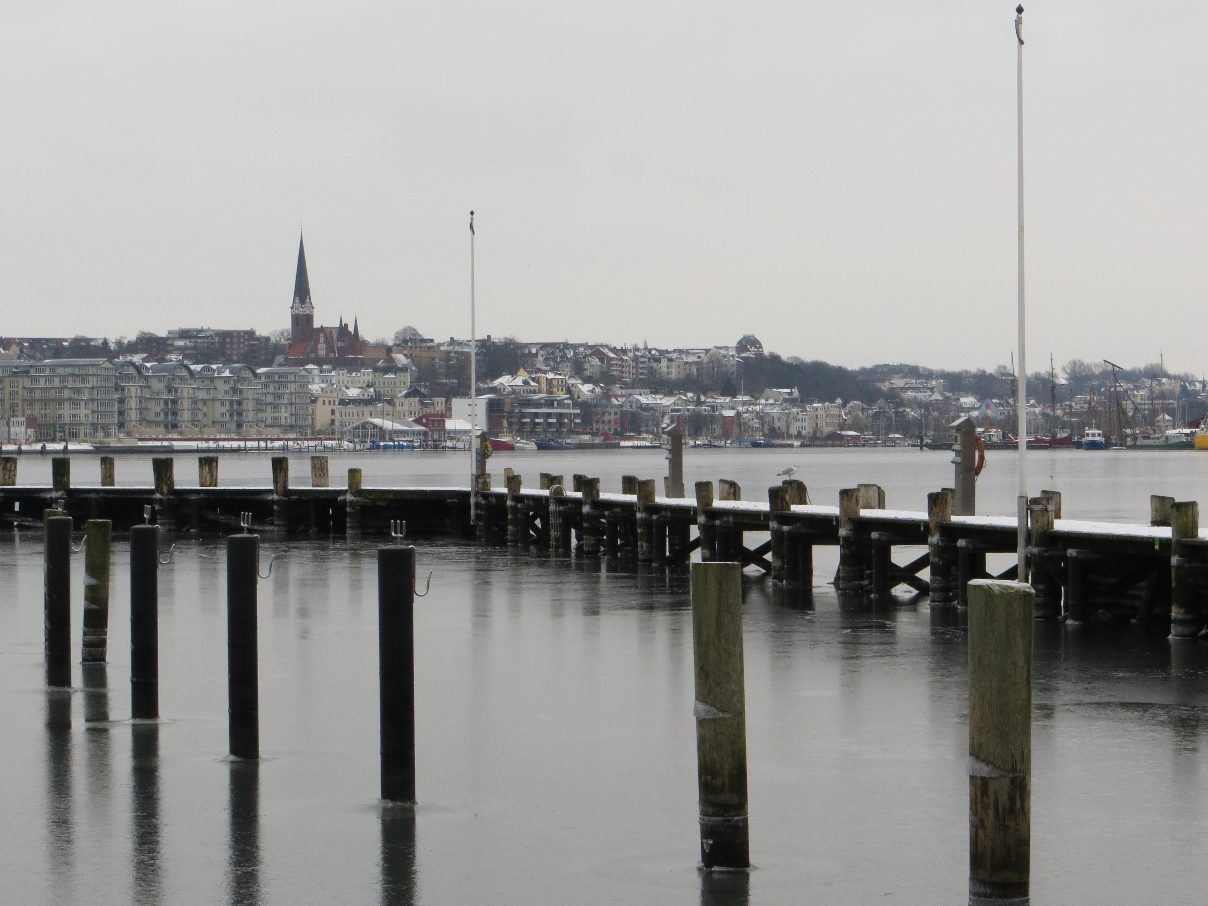 Flensburger Hafen im Schnee von Galwik aus; Werftkontor, Klarschiff im Bau; Gastseglerhafen und Fischreihafen sowie am rechten Rand der Museumshafen auf dem Westufer